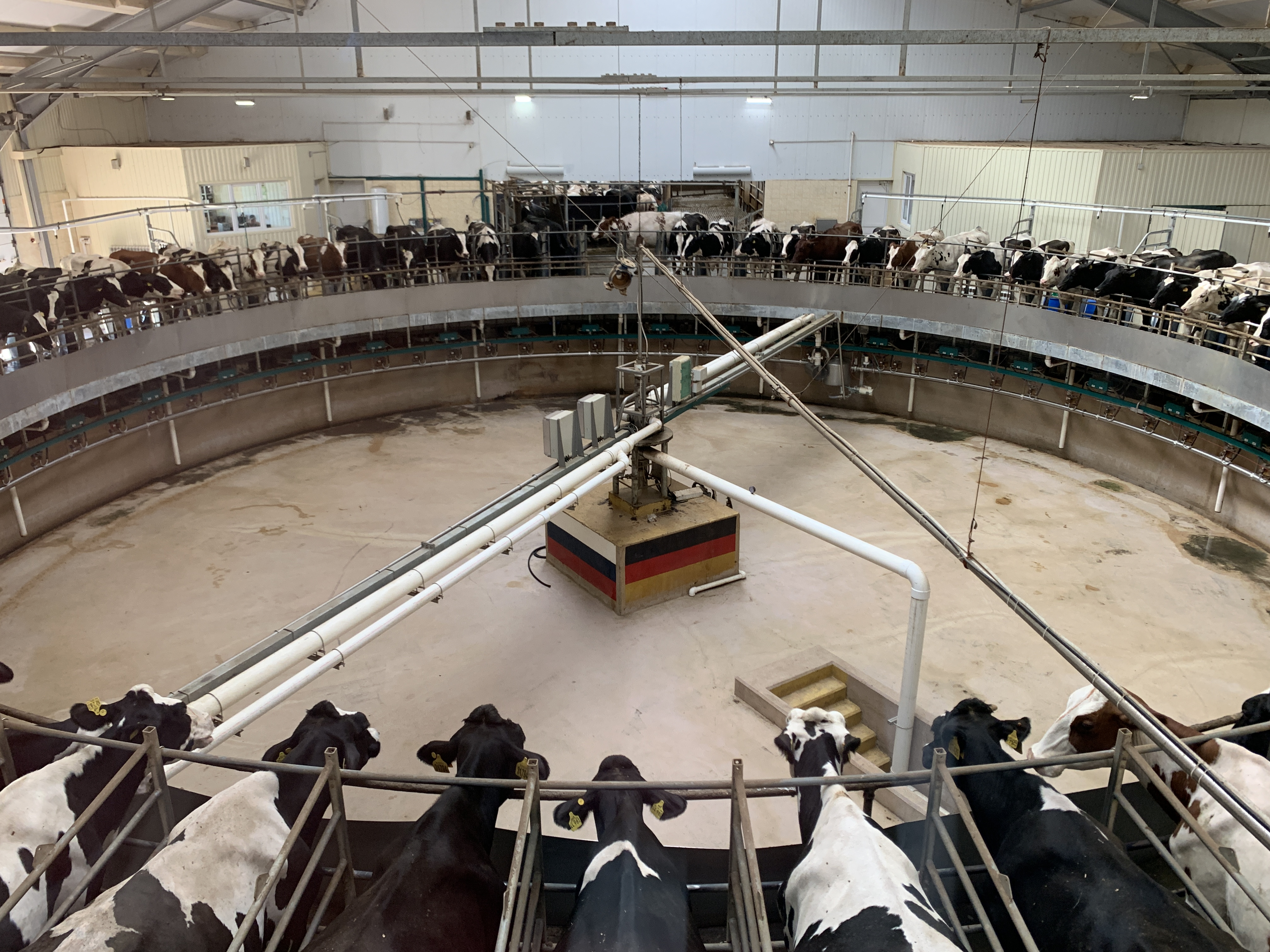 Ringförmige Melkanlage der EkoNiva-APK Holding in Russland